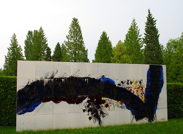 Spomenik Ede Murtića uz njegov grob na Mirogoju u Zagrebu